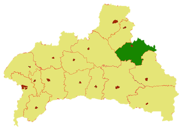 Hancavický rajón v rámci Brestské oblasti